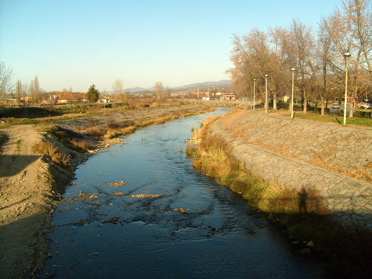 Svrljiški Timok